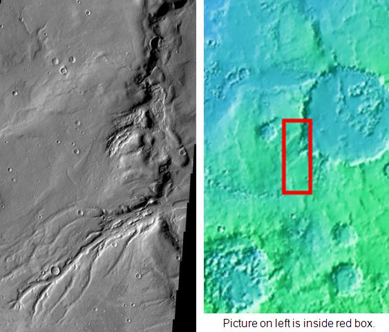 سیمیکن شہابی گڑھے میں پیچیدہ نالیوں کا نظام۔ محل وقوع اسیمینس لاکس چو گوشہ ہے۔